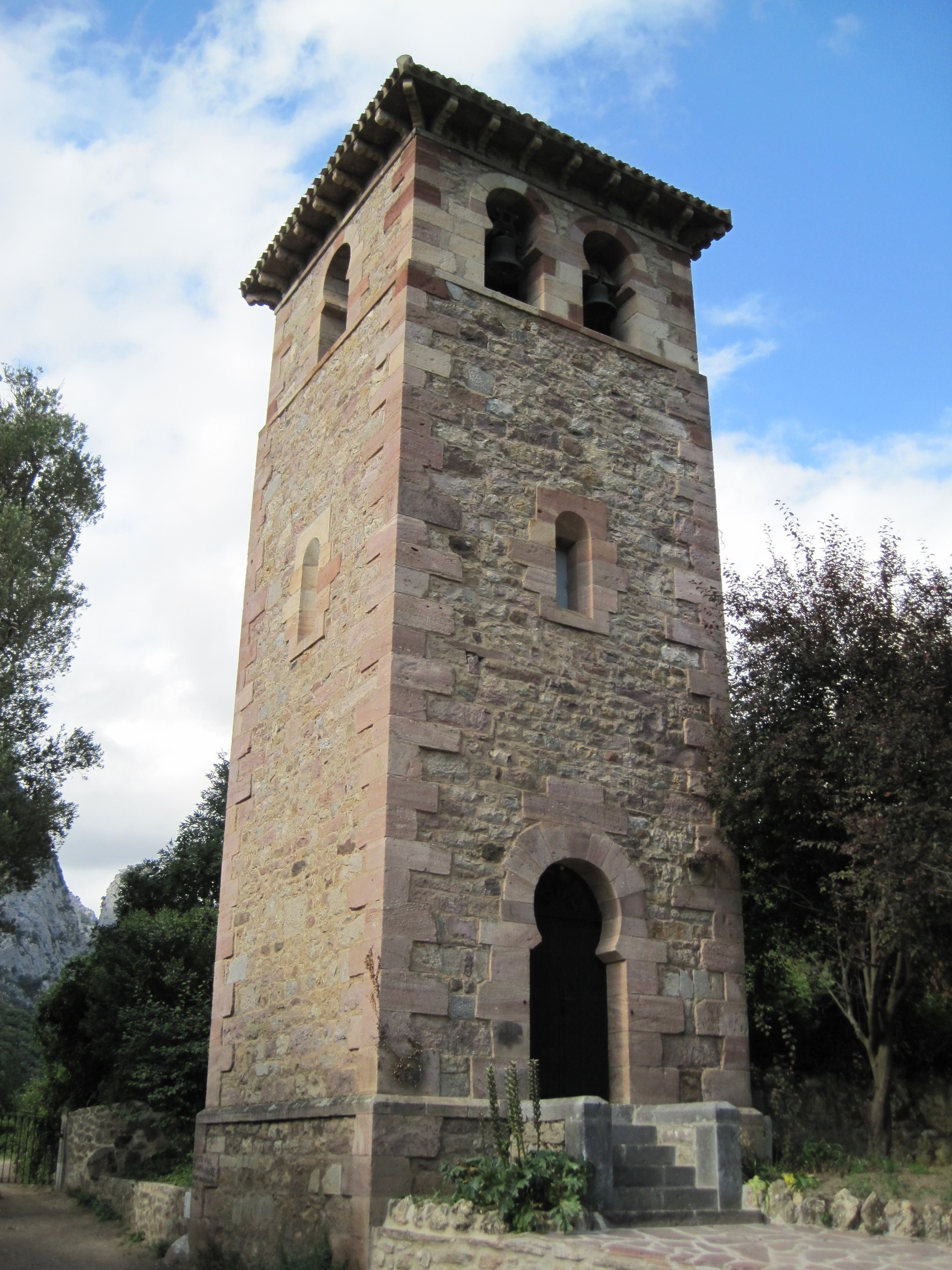 Campanario de la iglesia de Santa María de Lebeña (Cantabria, España).